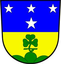 Wappen von St Niklaus